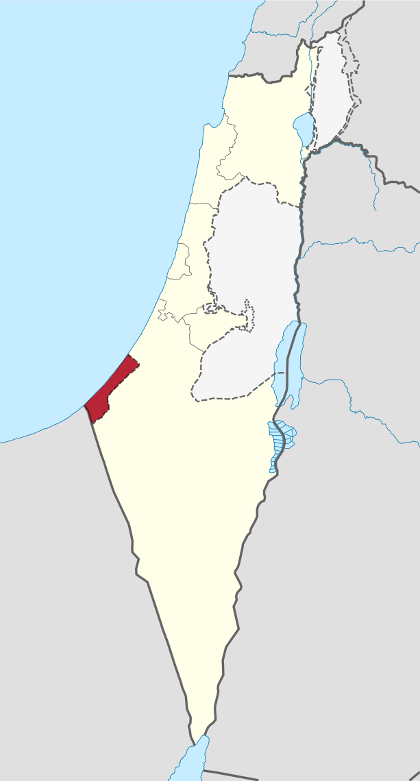 Gaza Strip region